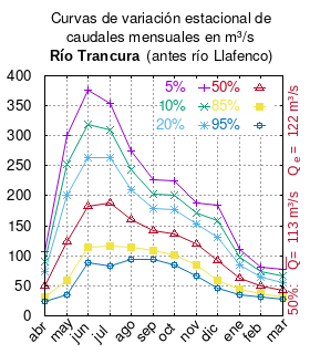 Curvas de variación estacional del río Trancura antes del río Llafenco. # Dirección General de Aguas # Diagnóstico y clasificación de los cursos y cuerpos de agua según objetivos de calidad. Cuenca del río Toltén. # Santiago de Chile # Ministerio de Obras Públicas (Chile) # 2004 # url: # urlarchivo: # Tabla 4.5: Río Trancura antes río Llafenco (m3/s) , pág. 45 mes 5% 10% 20% 50% 85% 95% abr 106.20 89.92 73.52 50.02 31.13 23.56 may 300.04 252.32 201.41 123.63 59.55 35.64 jun 375.22 319.72 263.37 181.81 115.19 88.10 jul 354.04 310.17 262.83 187.46 116.51 83.70 ago 273.75 243.33 210.97 160.61 114.79 94.23 sep 227.26 203.65 179.03 141.84 108.81 93.83 oct 224.00 201.04 176.37 137.32 100.89 84.18 nov 187.11 171.27 152.97 120.50 84.67 65.55 dic 184.78 158.34 131.33 91.86 59.14 45.67 ene 110.55 97.98 84.50 63.24 43.50 34.48 feb 81.08 72.94 64.17 50.23 37.15 31.12 mar 77.36 66.64 56.20 42.02 31.49 27.57 This plot was created with Gnuplot.